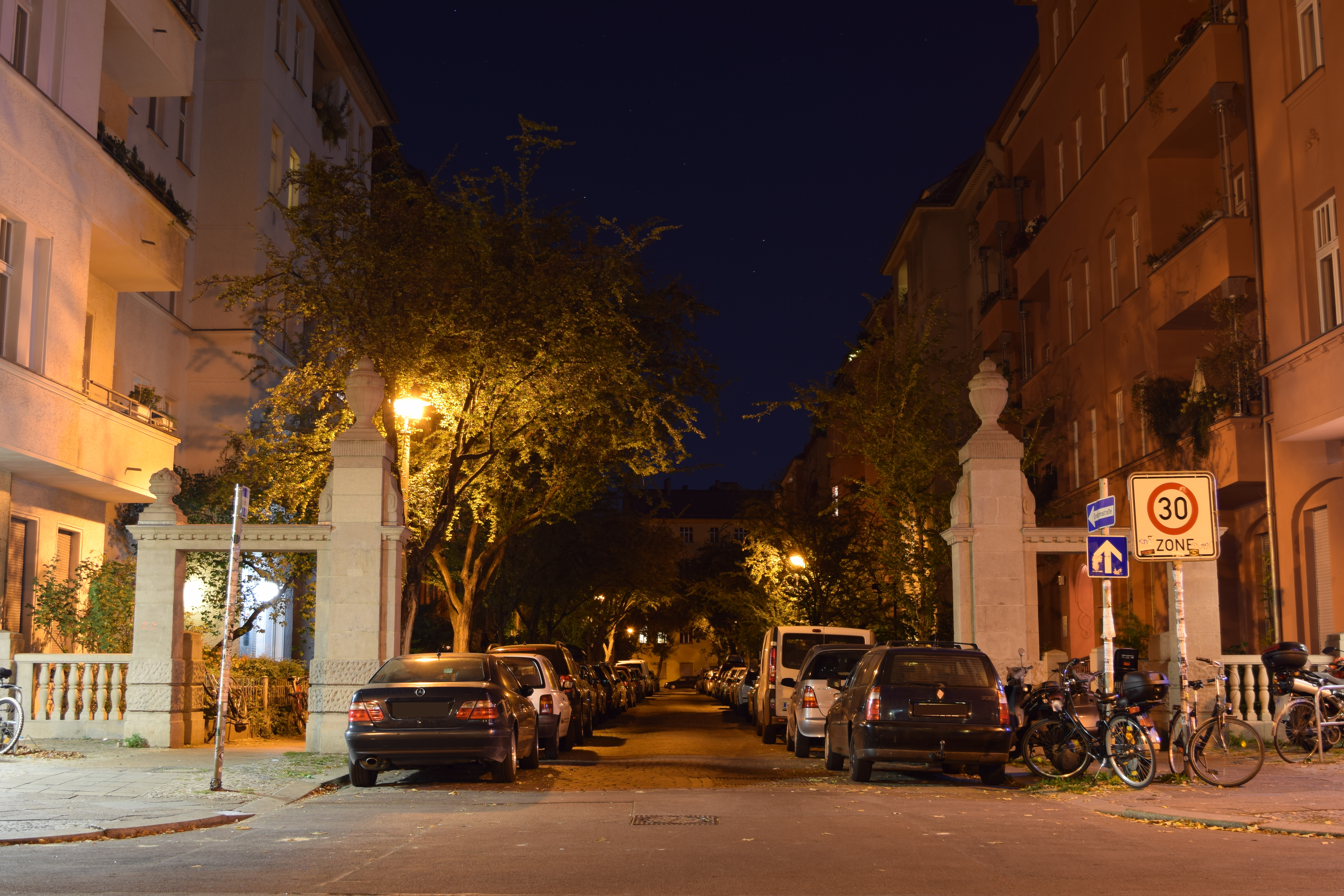 Das Bild zeigt die beiden wiederhergestellten Schmucktore der Knorrpromenade an der Wühlischstraße bei Straßenbeleuchtung während der Nacht.